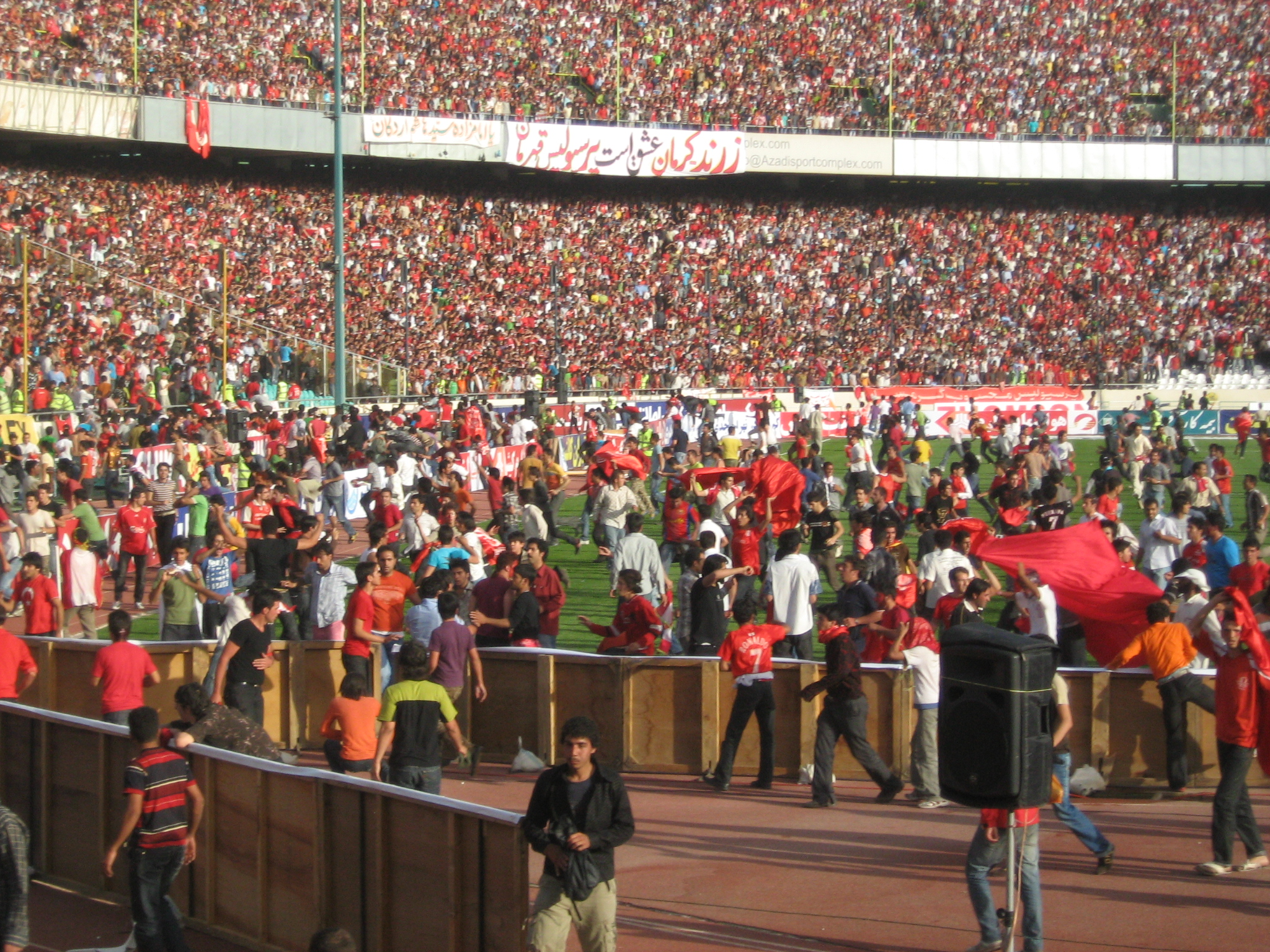 17. Mai 2008: Fans stürmen dien Platz nach dem Gewinn der iranischen Meisterschaft.